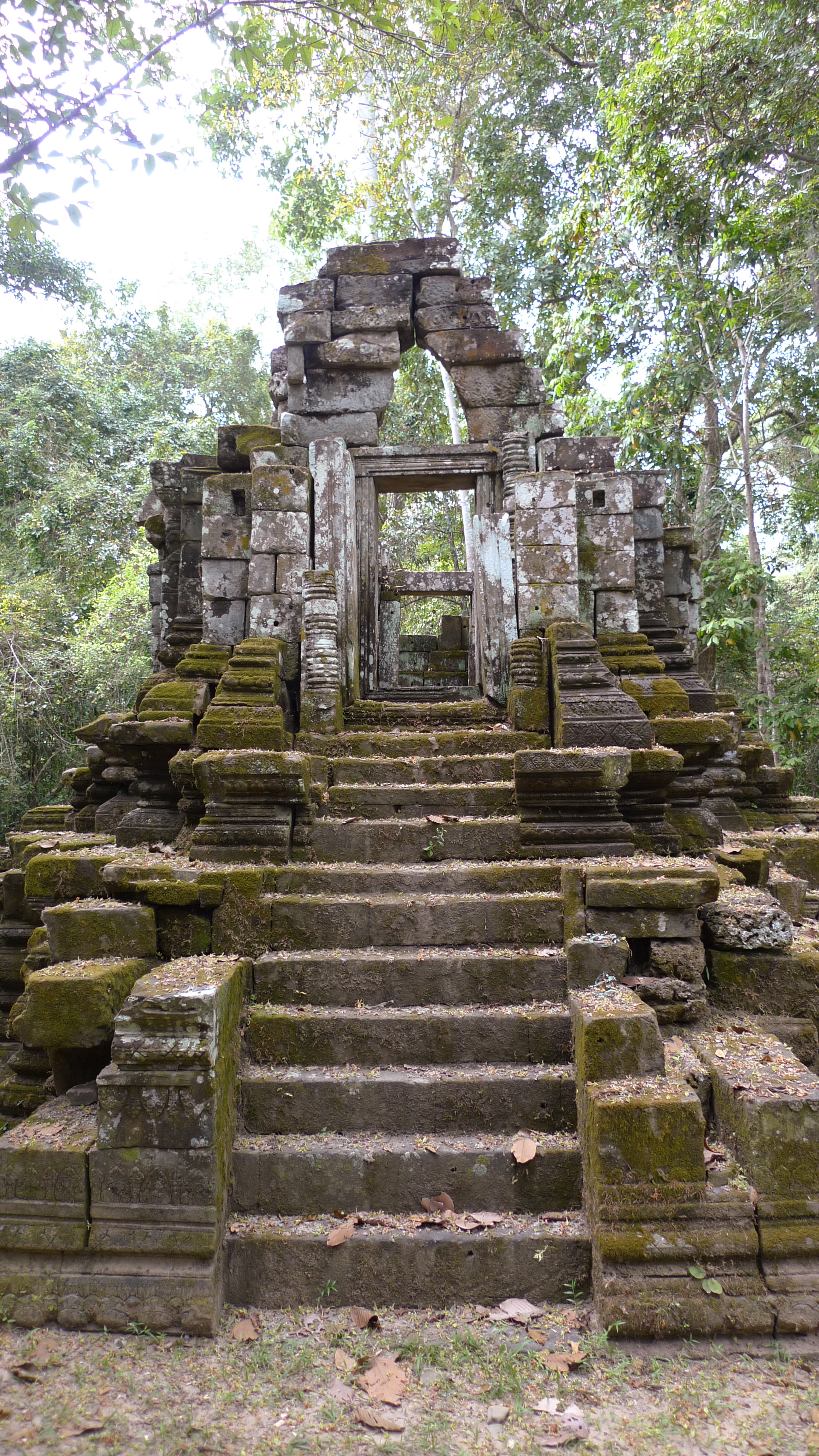 Mangalartha